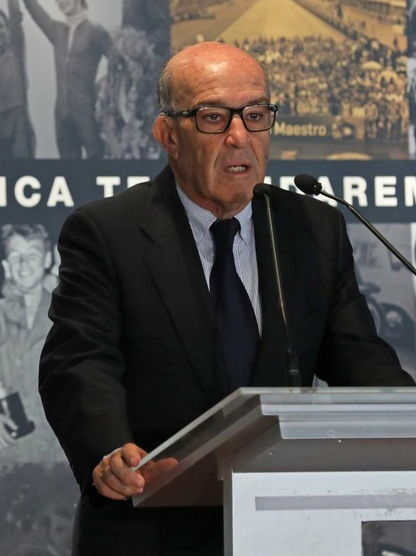 Instituciones y personalidades se han sumado esta mañana a familiares y amigos para rendir un sentido homenaje a Ángel Nieto, campeón mundial de motociclismo e hijo adoptivo de Madrid en un acto organizado por su familia con la colaboración del Ayuntamiento de Madrid y el Consejo Superior Deportes. Desde el Pabellón de los Jardines de Cecilio Rodríguez, del Parque de El Retiro, la alcaldesa de Madrid, Manuela Carmena ha destacado la personalidad “excepcional” del campeón “12+1”, “su pasión y su bondad”. La ciudad de Madrid, “donde pasó su infancia y se fraguó su pasión, necesita muchas personas como él y no le olvidará nunca”, manifestó la alcaldesa, en unas palabras que también repasaron otros aspectos de “quien fue capaz de poner a España en un lugar impensable del motociclismo internacional”.